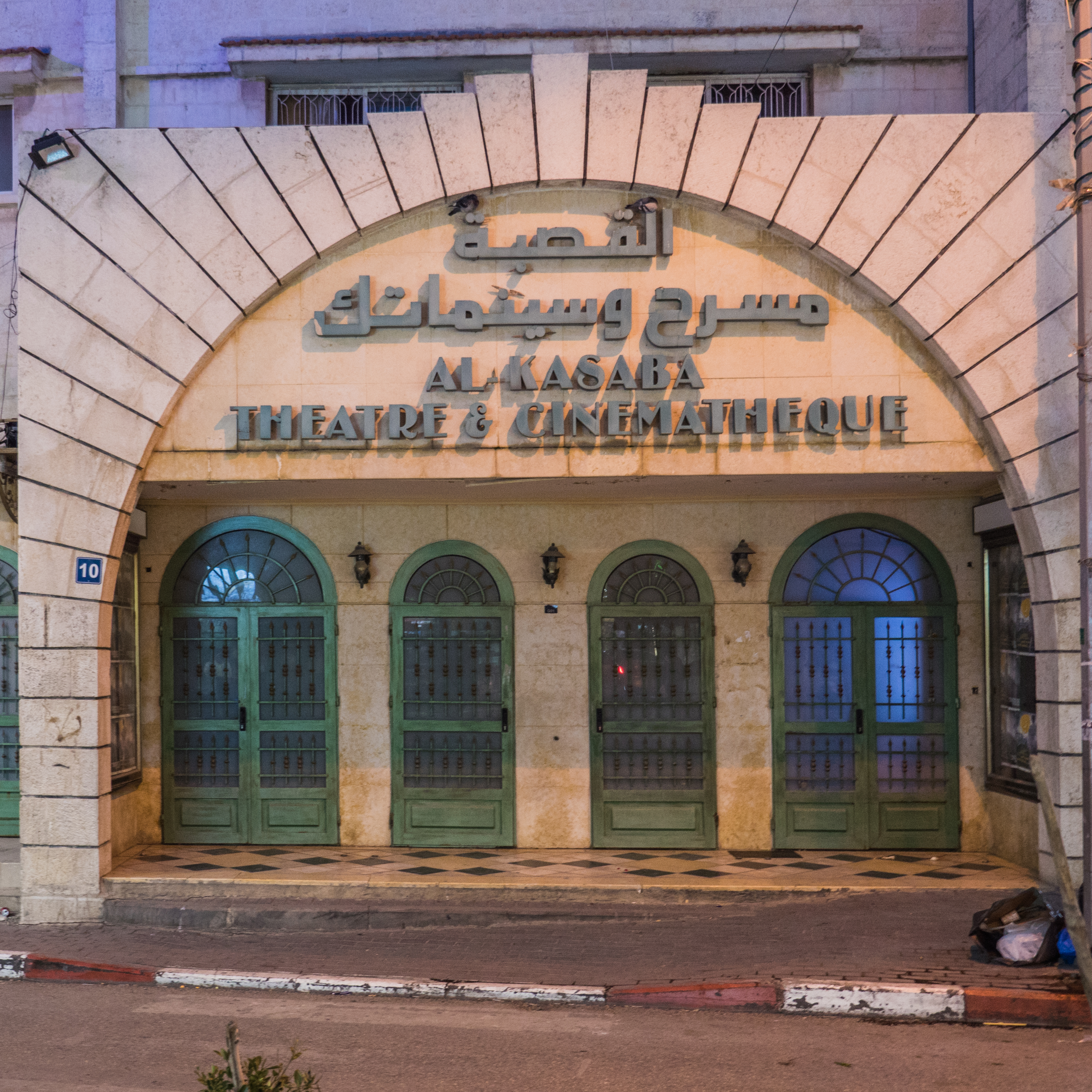 façade Théâtre Al-Kasaba en 2017